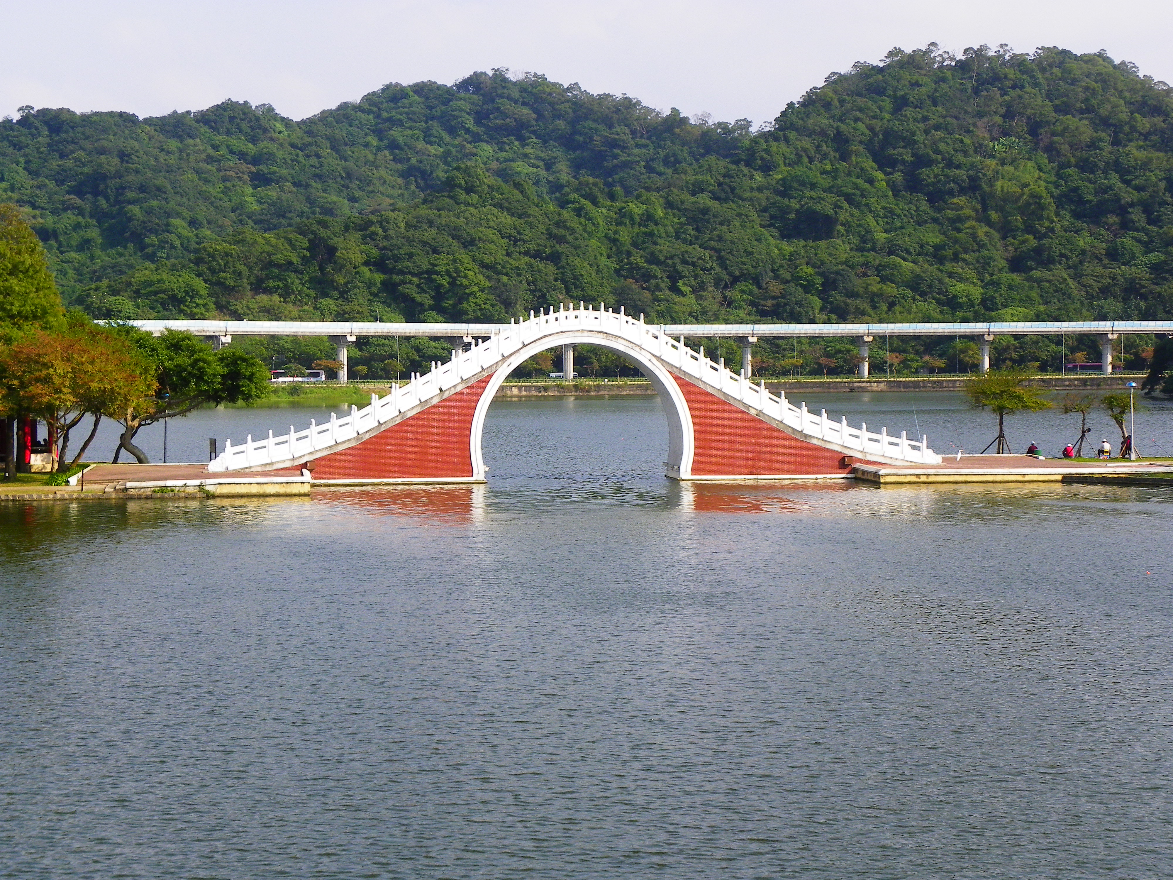 臺北市內湖區大湖公園錦帶橋。